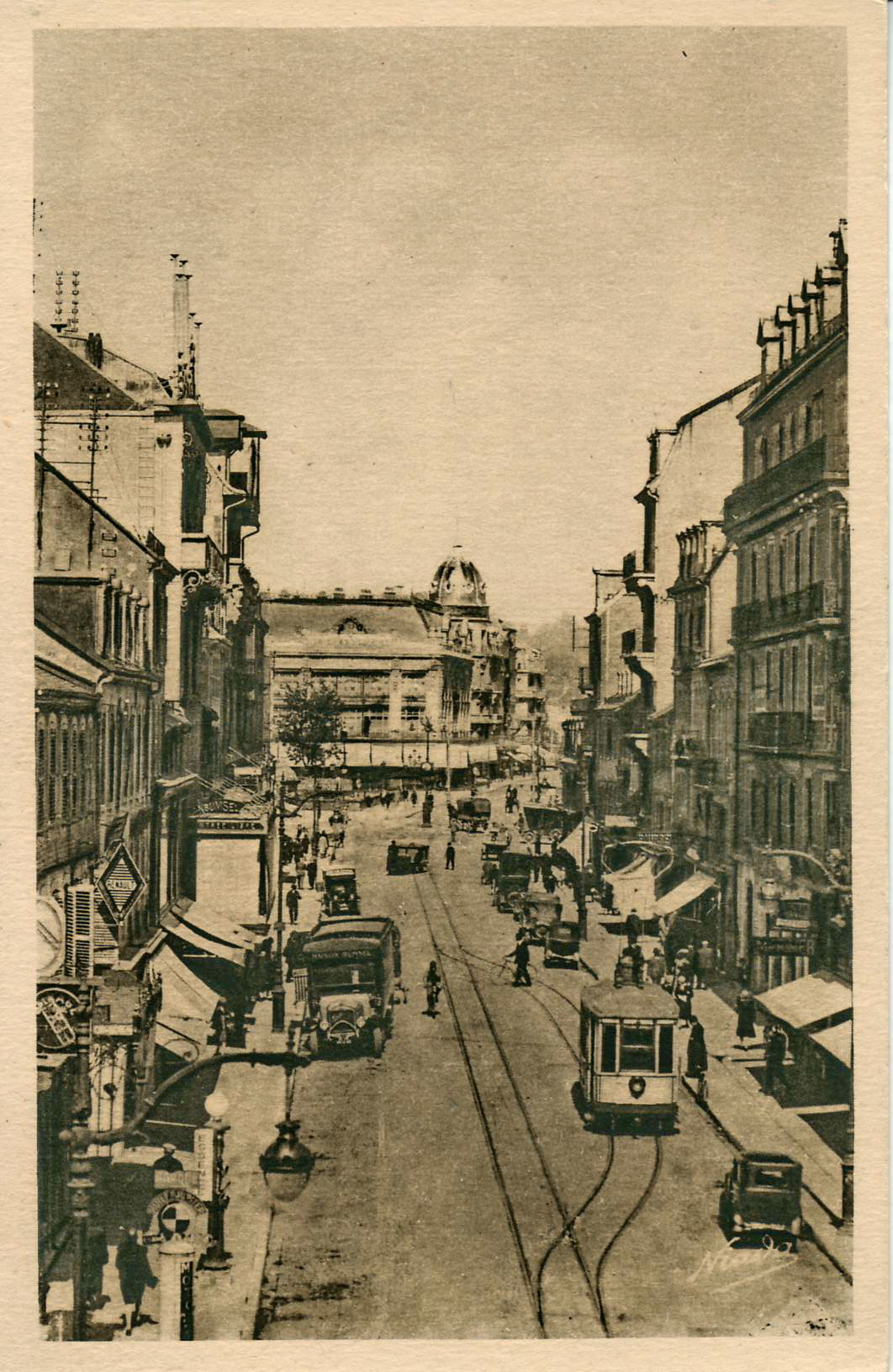 Carte postale ancienne éditée par Adain à Belfort : Belfort - Faubourg de France et Boulevard Carnot. Cue d'un évitement du tramway de Belfort